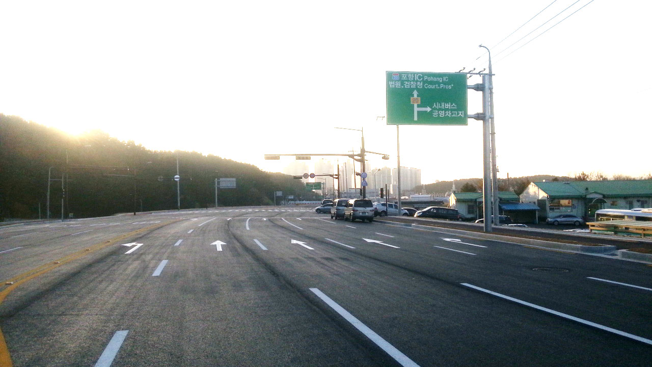 8차선 새천년대로 양덕가는 방향